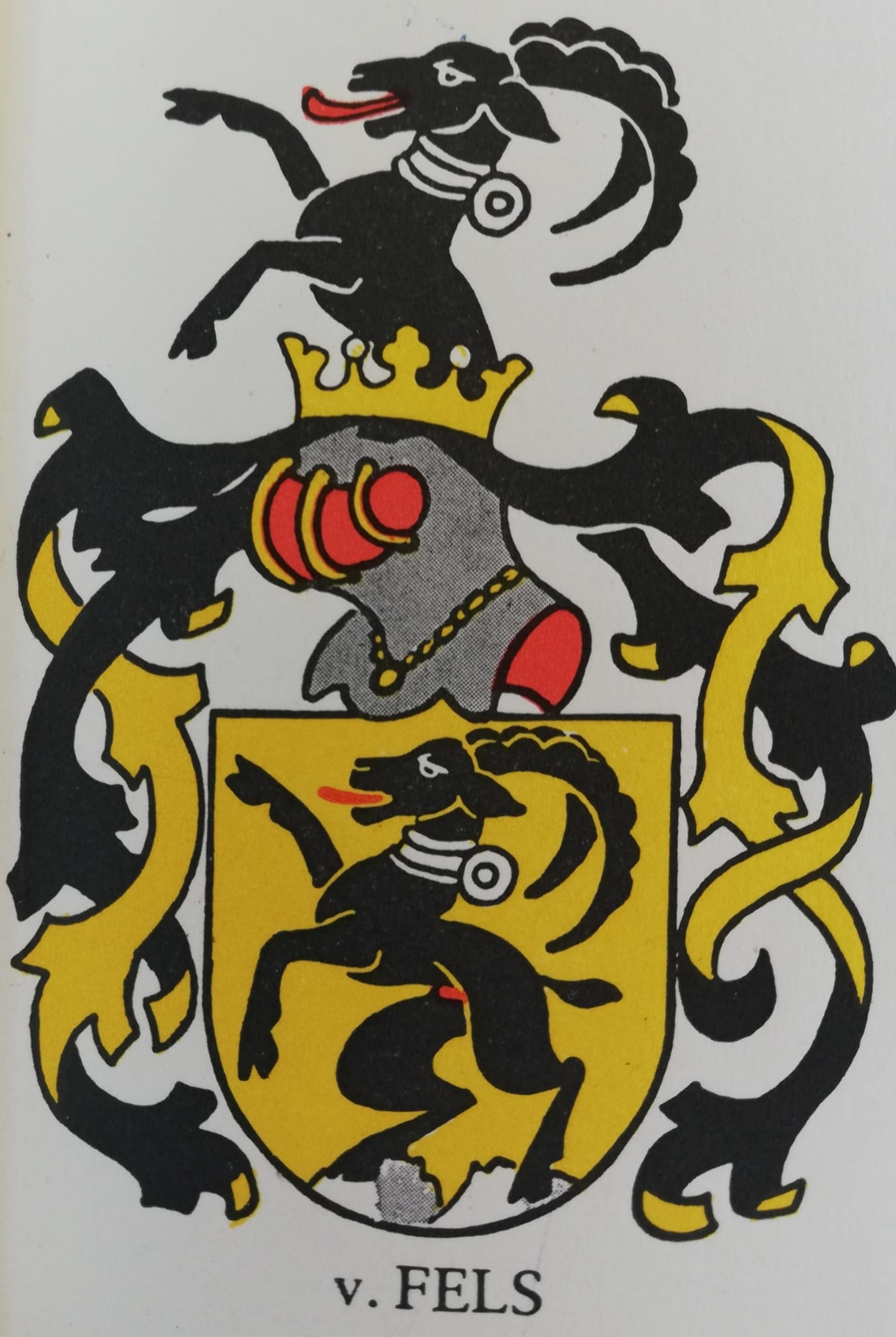 C'est une Armoirie venant du livre héraldique de Saint-Gall